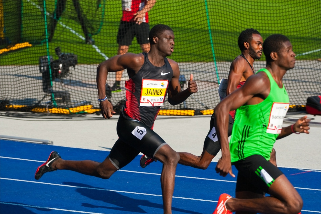 400m Männer James Kirani, Weltmeister von Daegu